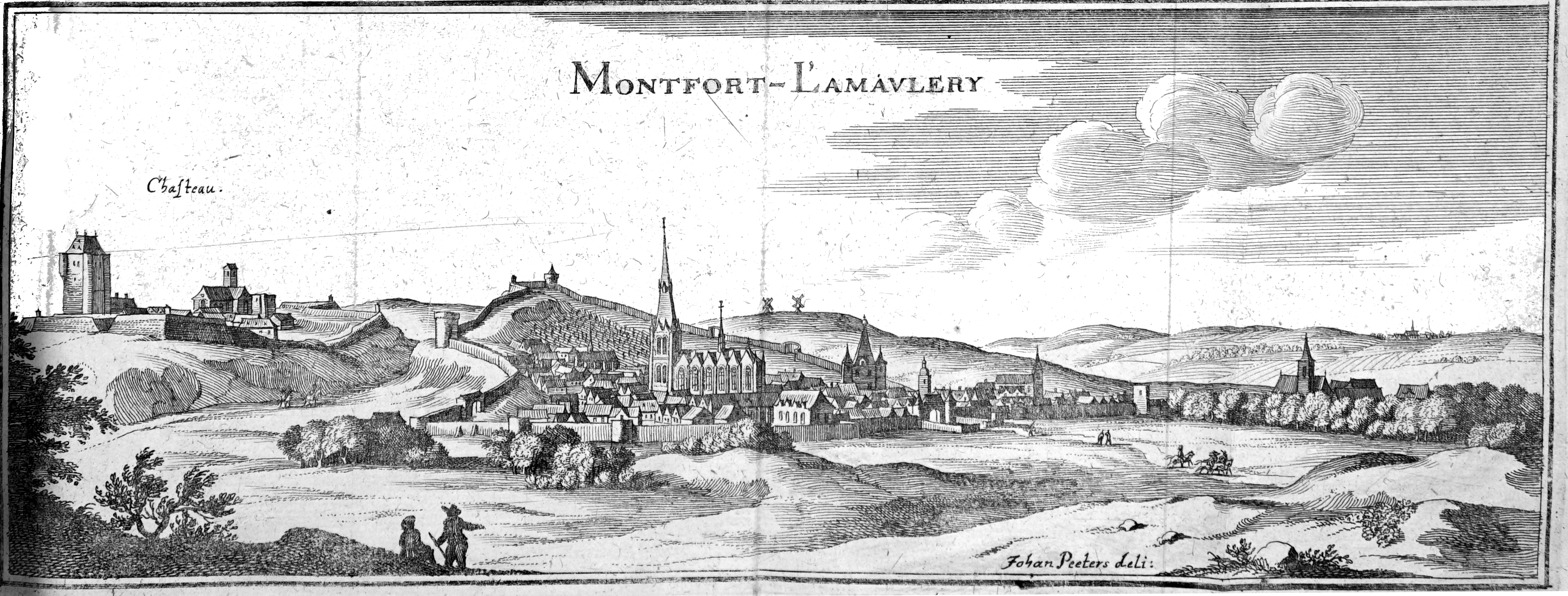 provenant de TOpographiae Galliae.